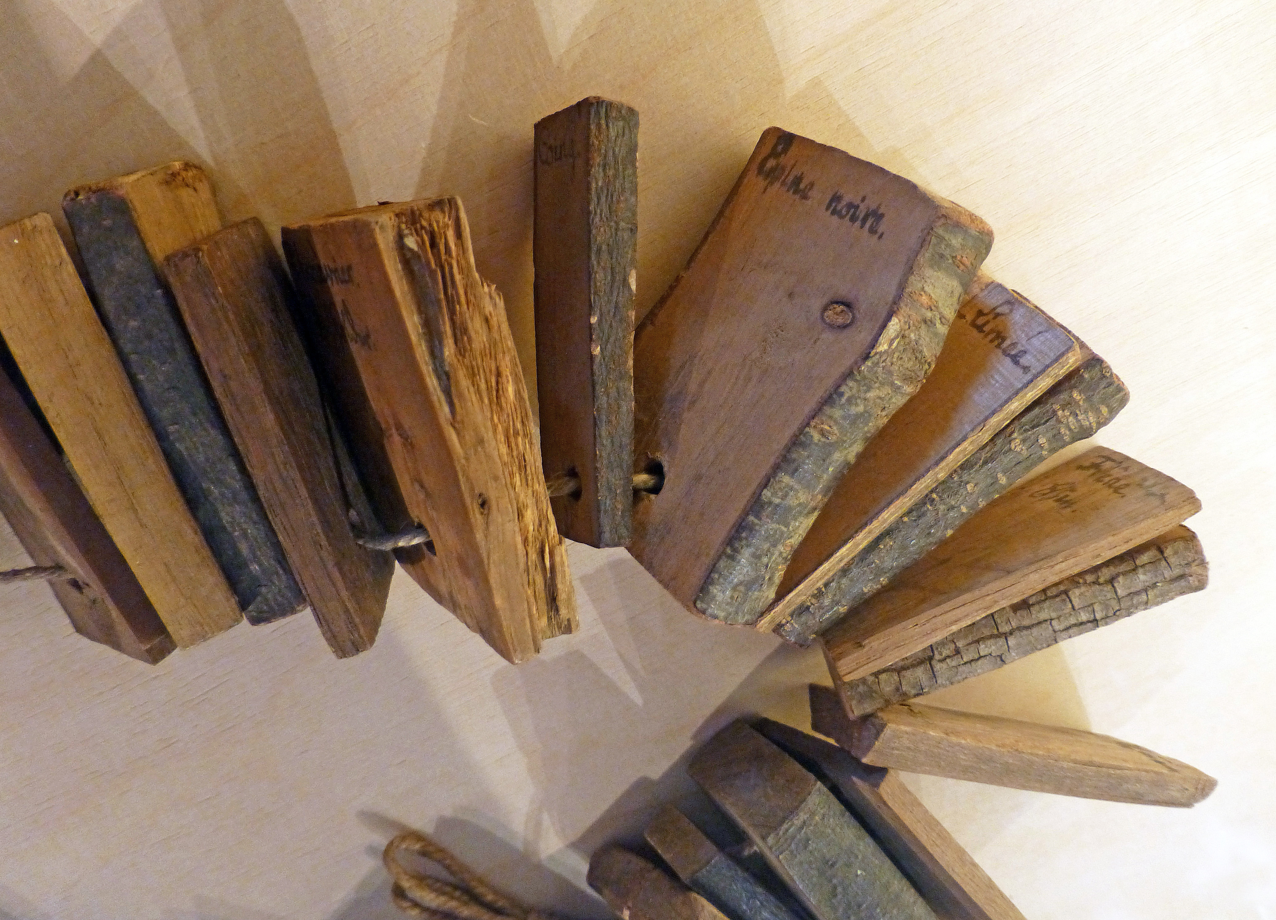 Echantillons de bois régionaux du XVIIIe siècle, réunis par le pasteur Jean-Frédéric Oberlin. Les noms français et allemands sont mentionnés pour chaque plaquette. Musée Jean-Frédéric Oberlin à Waldersbach (Bas-Rhin, Alsace). Dépôt du Musée alsacien de Strasbourg.